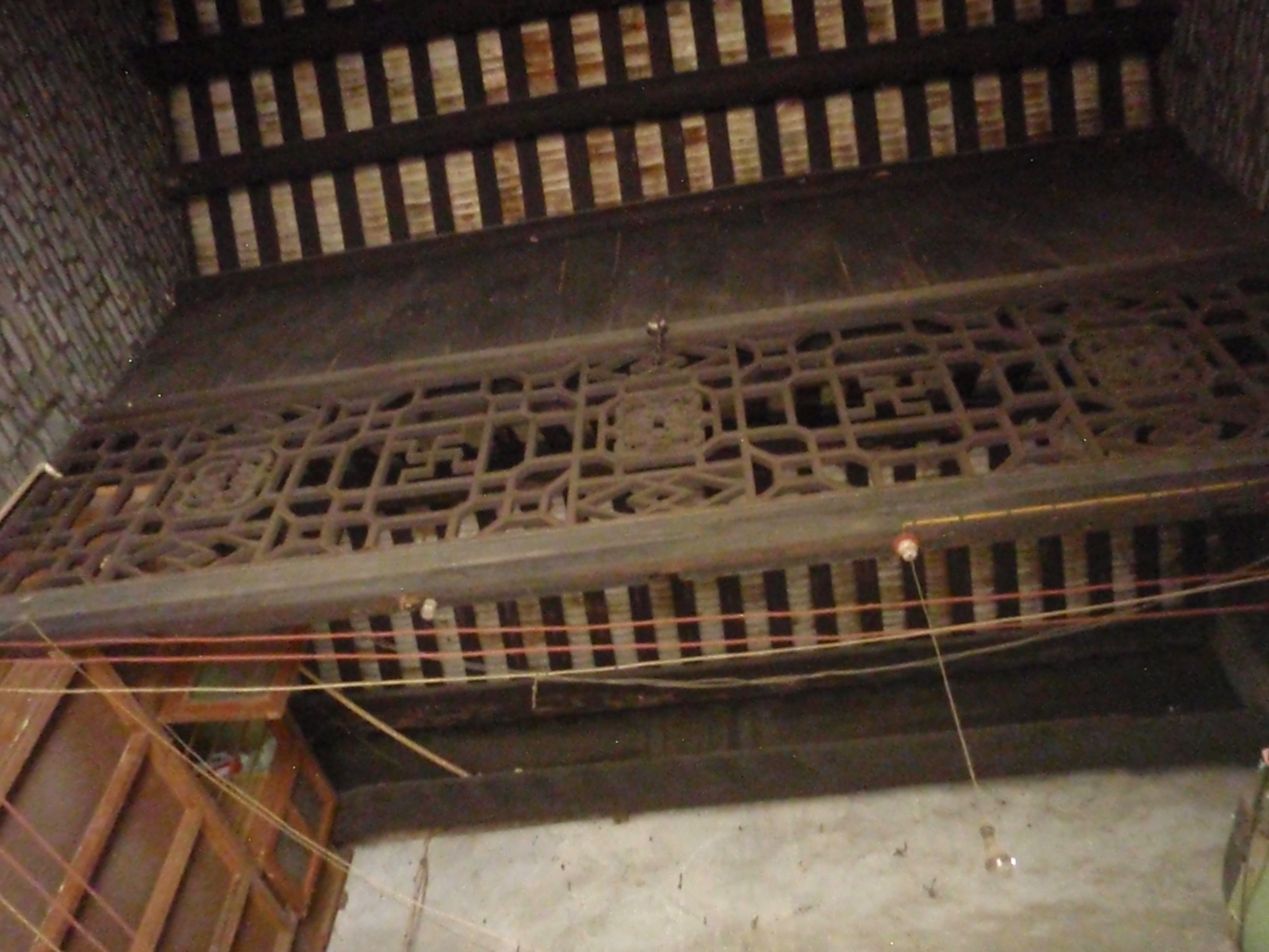 粵語: 廣州 潘氏家廟